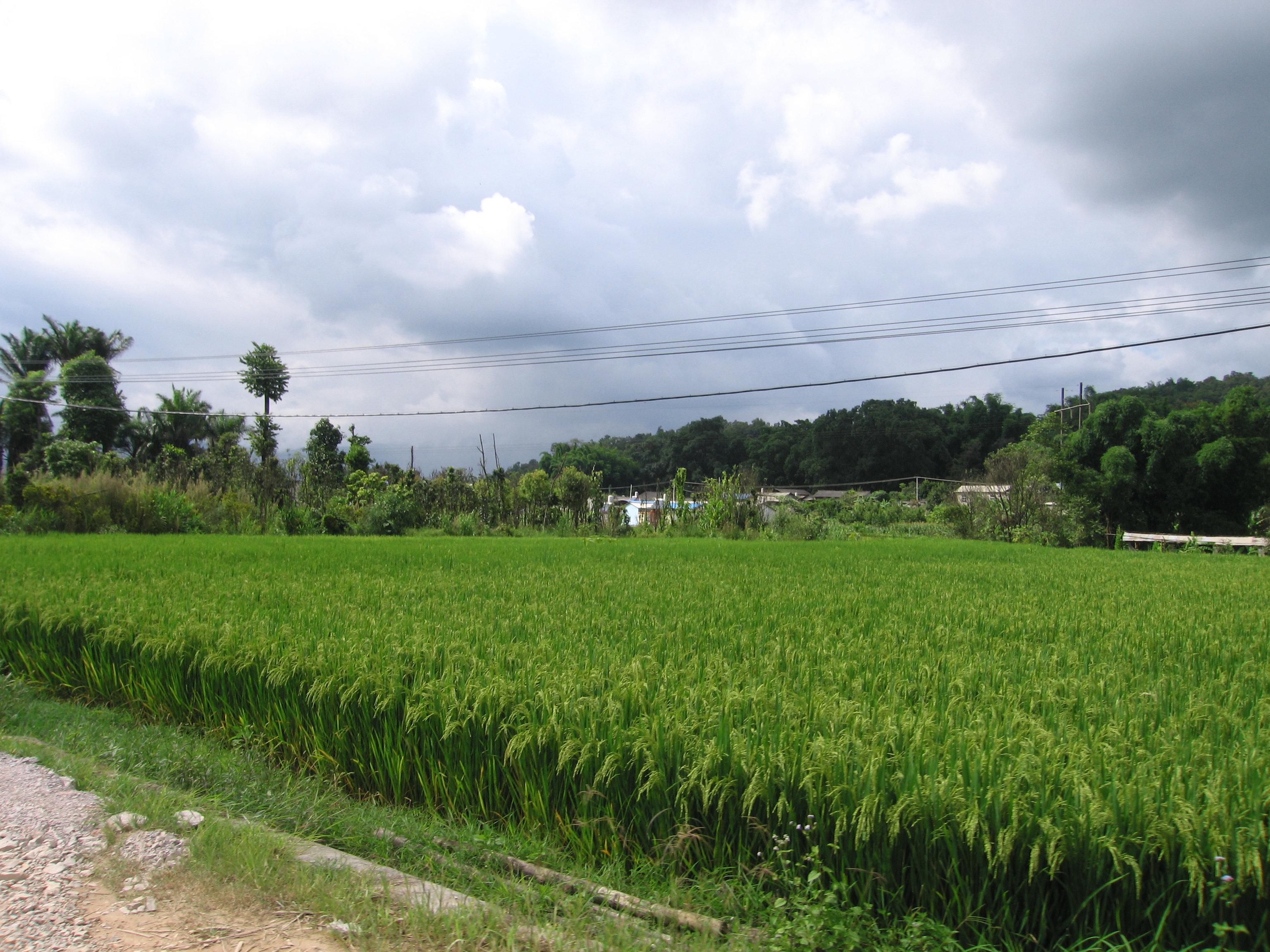 中文（中国大陆）: 芒市芒满村